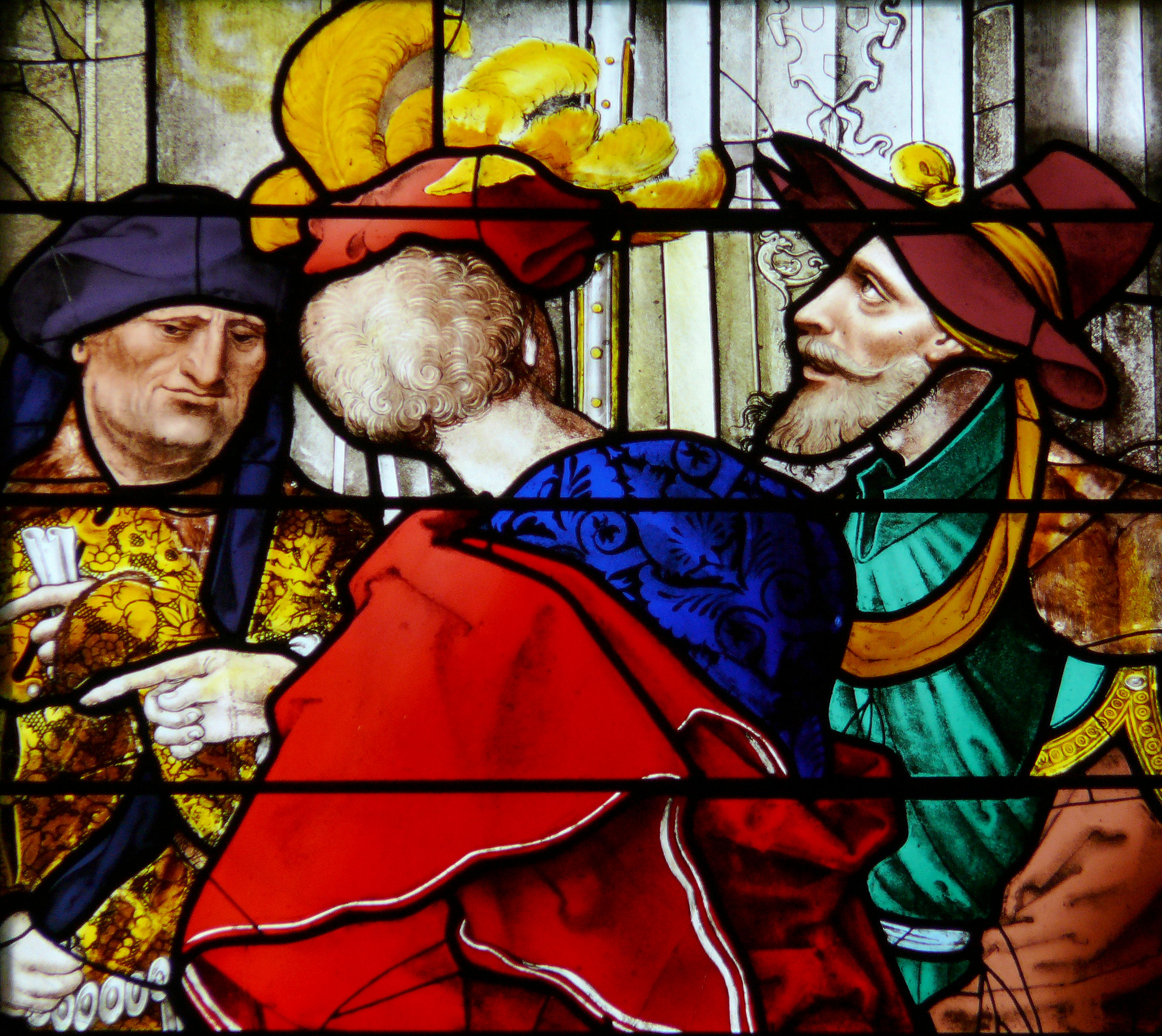 Paris - Eglise Saint-Gervais-Saint-Protais - La Sagesse de Salomon - Personnages du jugement